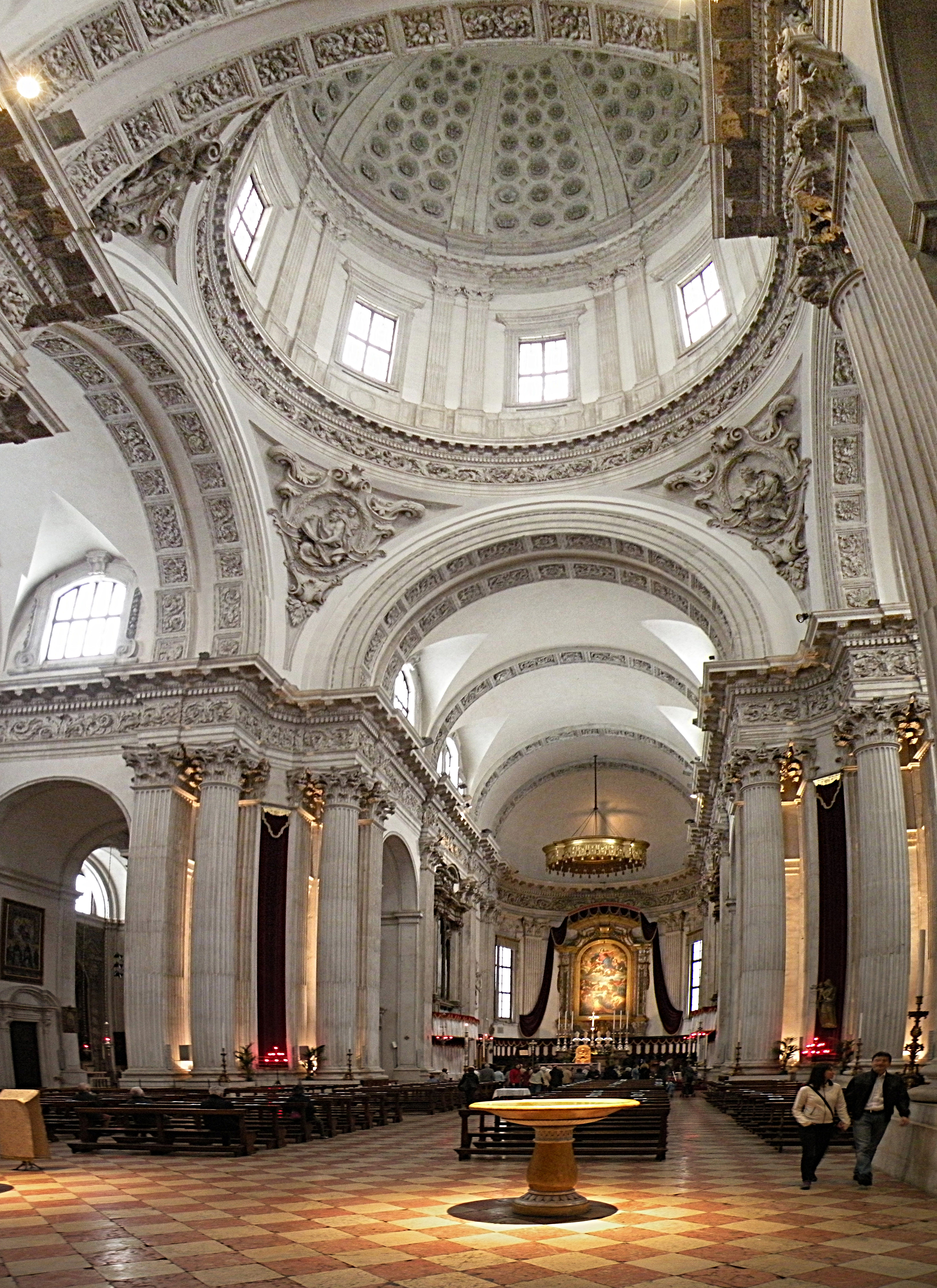 Интерьер Duomo Nuovo в Брешии